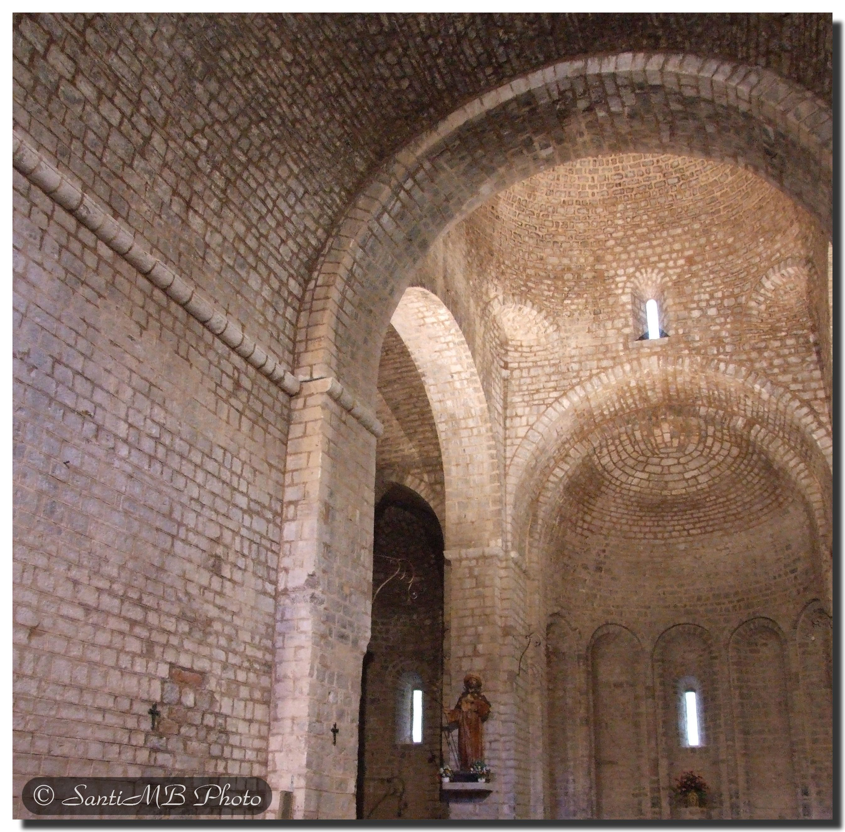 Església de Sant Jaume de Frontanyà